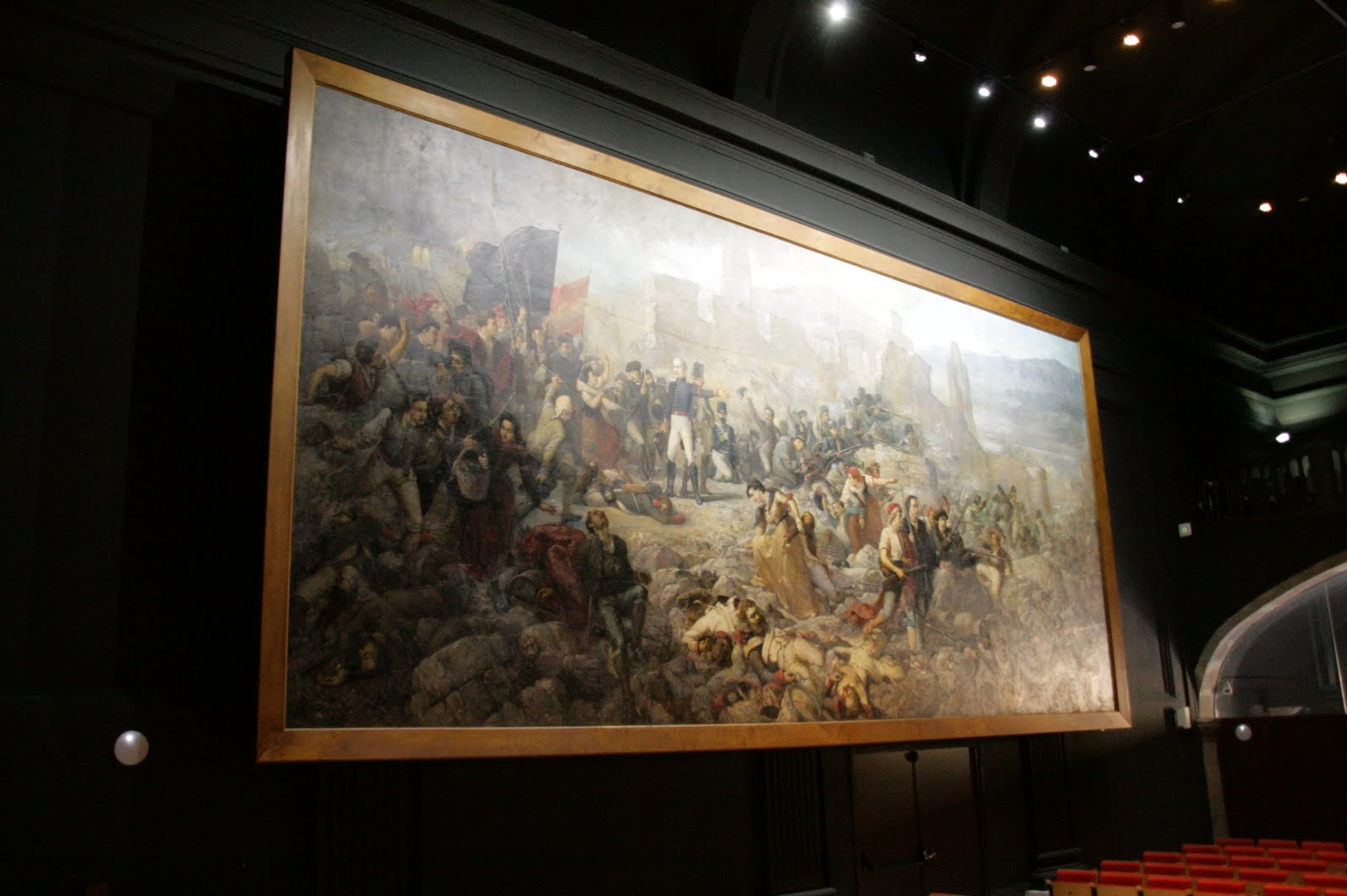 Exposició Anatomia d'un quadre, al voltant de l'obra El Gran dia de Girona al Museu d'Art de Girona